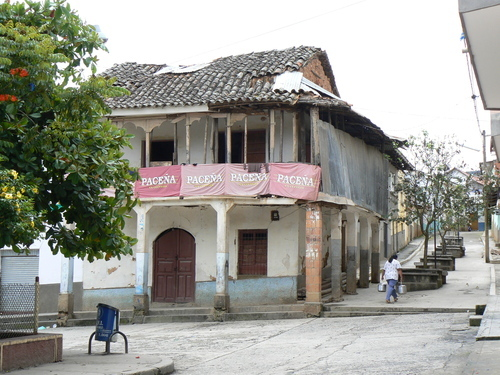 Bolivia